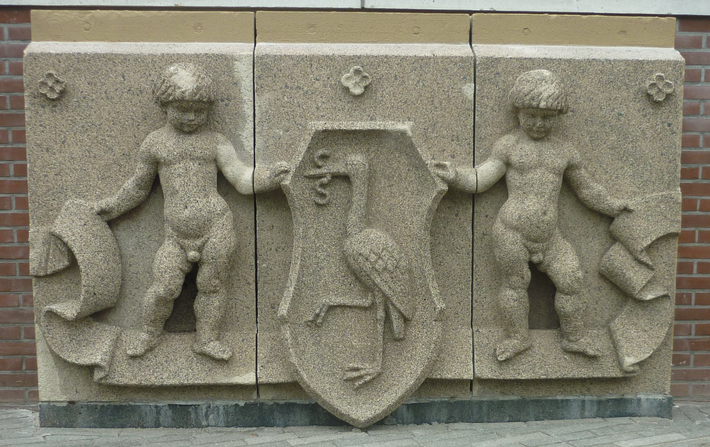 Monchyplein Den Haag: ornament met Haags stadswapen gemaakt door Dirk Bus, gemaakt voor het stadhuis aan de Burg. Patijnlaan